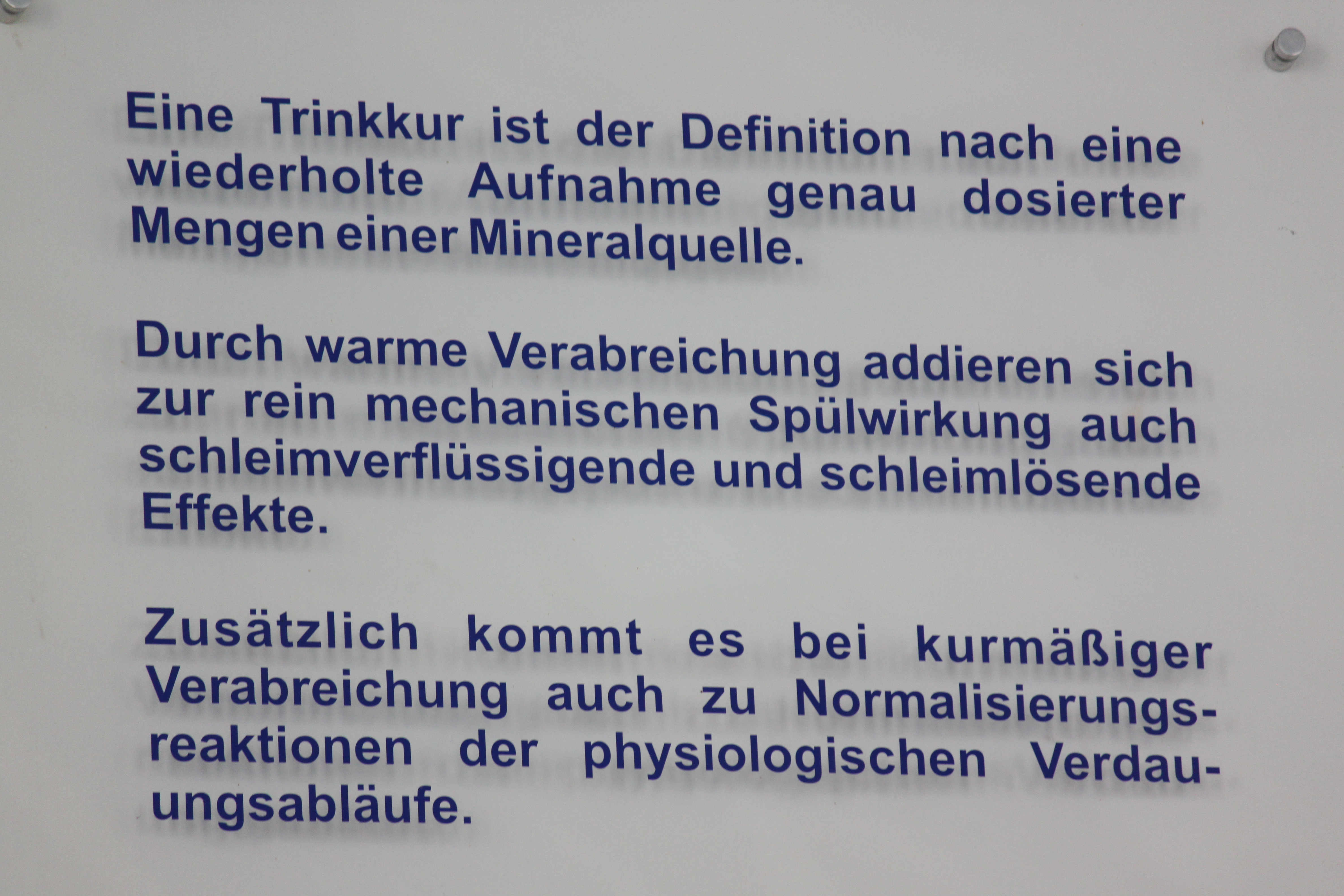 mit Beschreibung der Trinkkur im Brunnenhaus Bad Gleichenberg, Detail